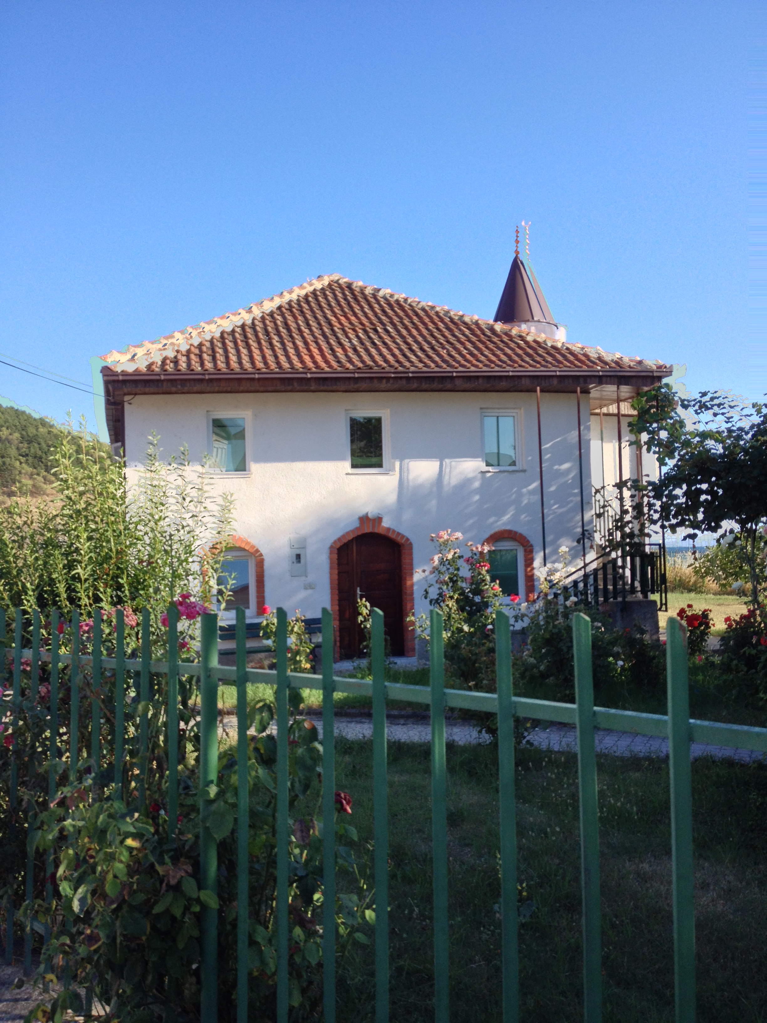 Die Gurci-Bey-Moschee in Ohrid, Mazedonien